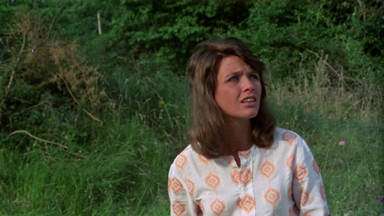 scena dal film Quelli che contano